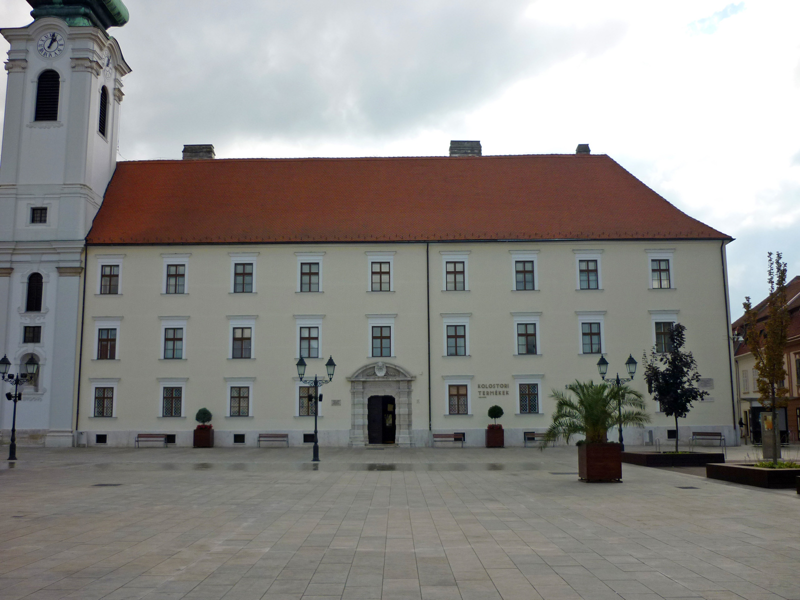 Bencés rendház (Győr, Széchenyi István tér 9.) This is a photo of a monument in Hungary. Identifier: 4395